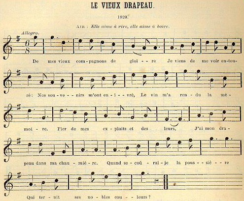 Une chanson de Béranger, un air ancien.